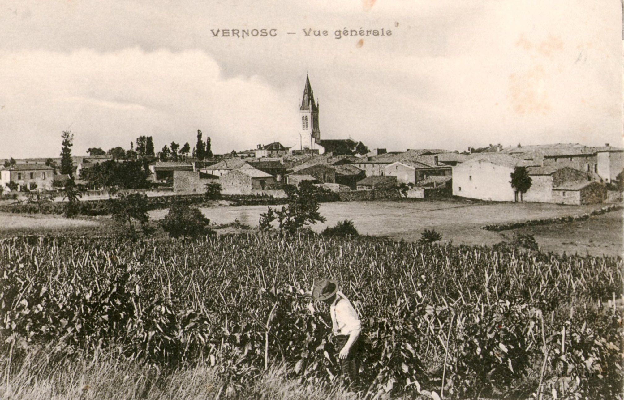 Vernosc vigneron